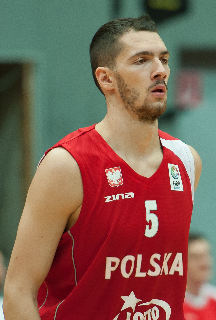 Basketball EM-Qualifikation Österreich gegen Polen Schwechat, 17. August 2014